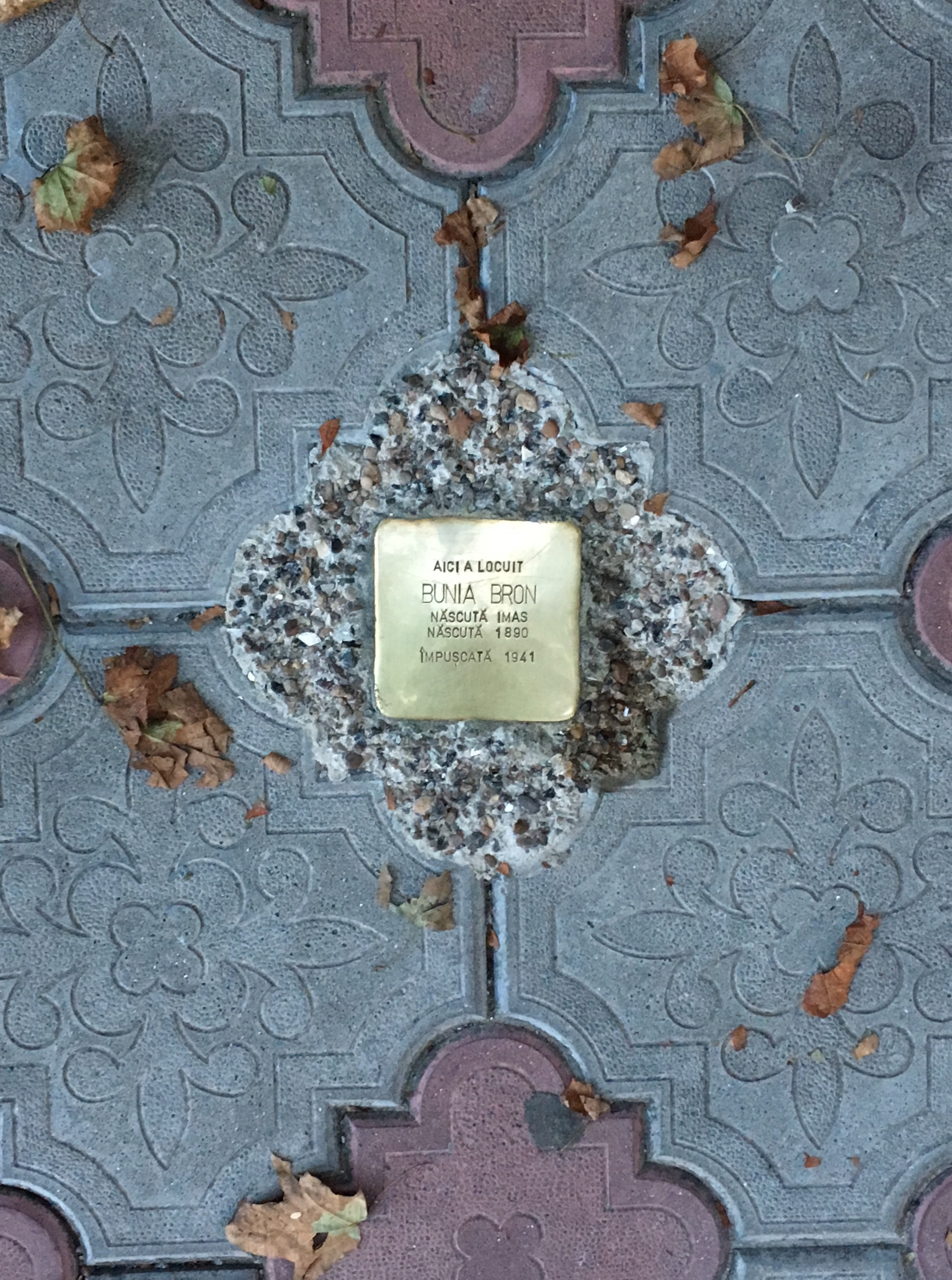 Stolperstein in Chisninau für Bunia Bron